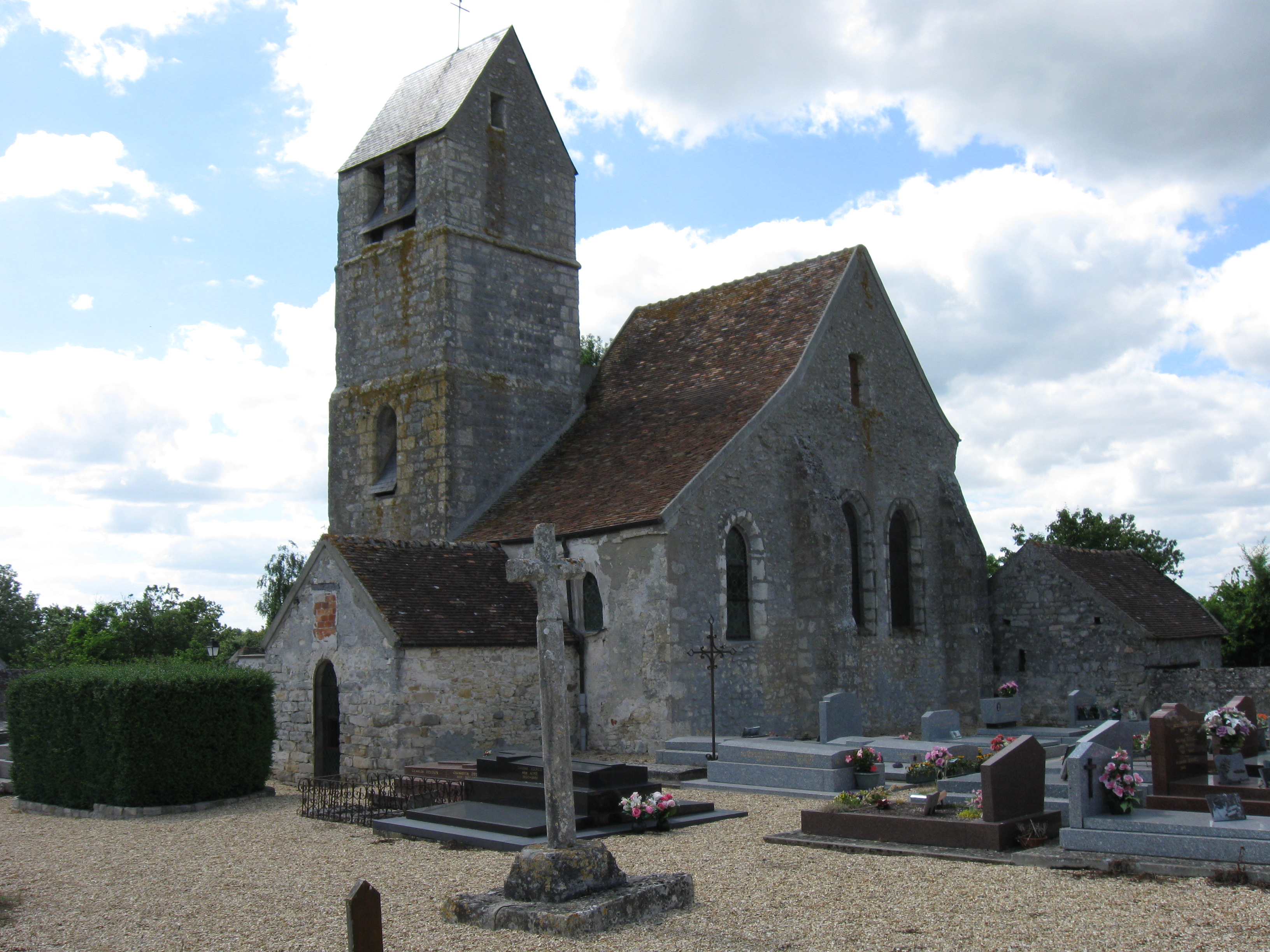 Église catholique Notre-Dame de l’Assomption. (Ormesson, département de la Seine et Marne, région Île-de-France).